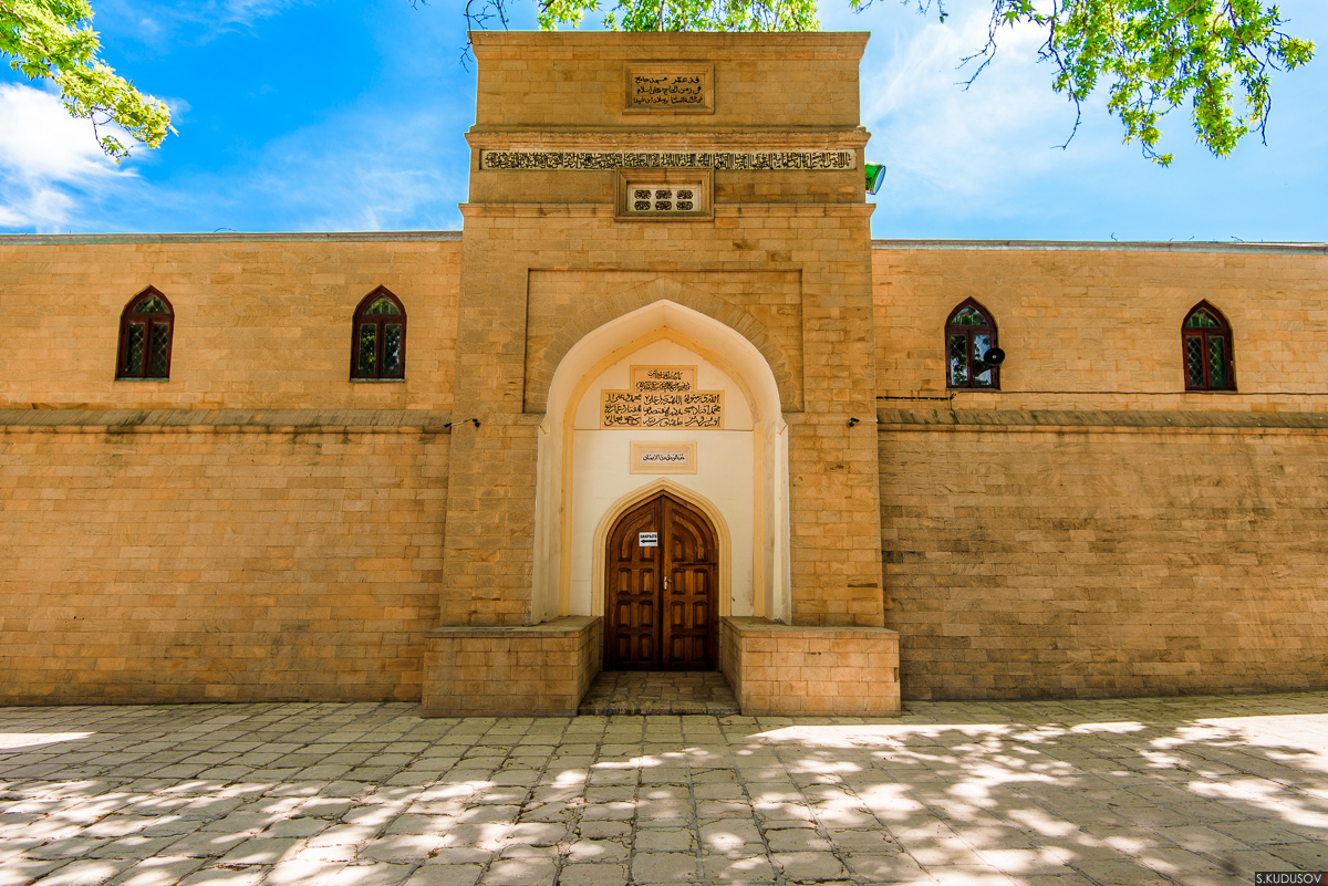 Джума мечеть города Дербент